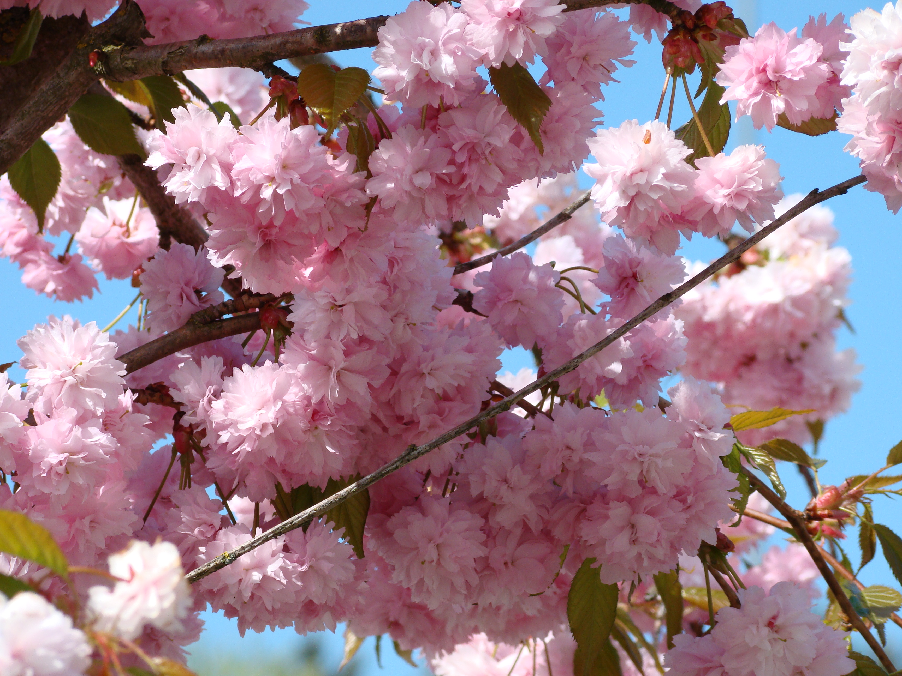 Japoniška vyšnia